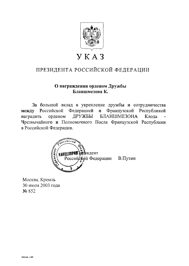 УКАЗ Президента РФ от 30.07.2003 №852 "О НАГРАЖДЕНИИ ОРДЕНОМ ДРУЖБЫ БЛАНШМЕЗОНА К."